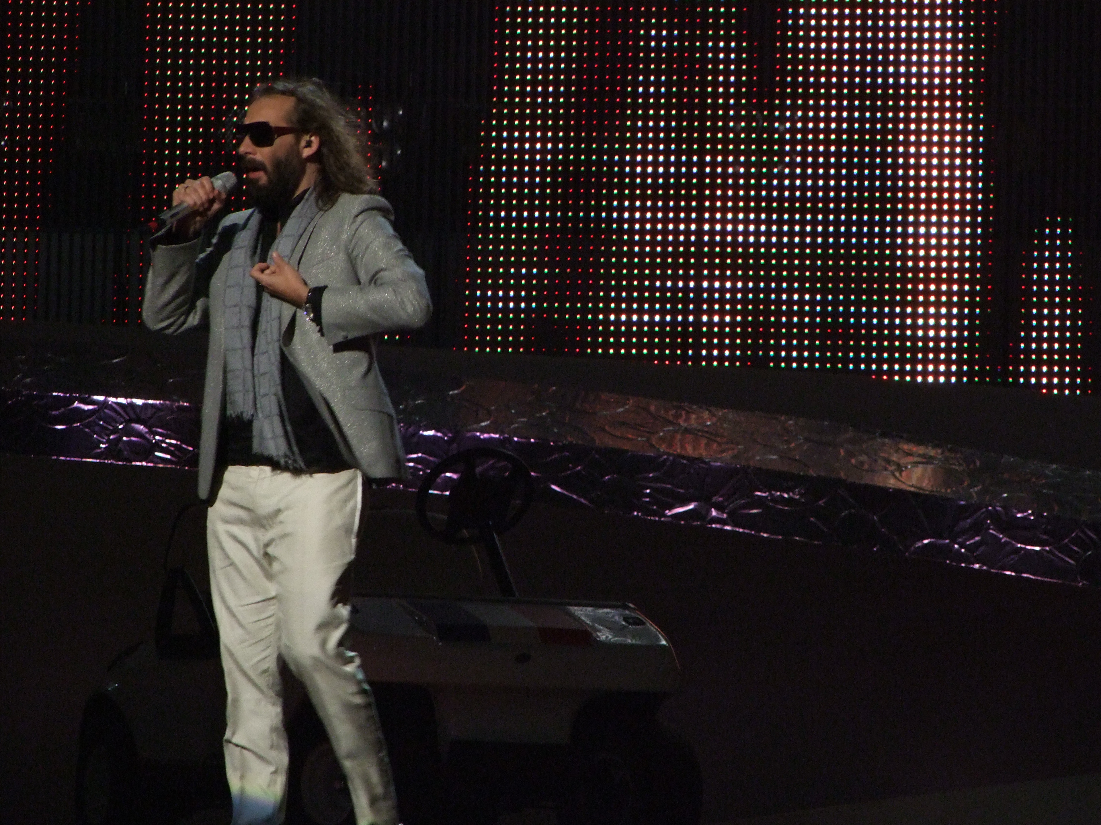 Final Eurovision 2008